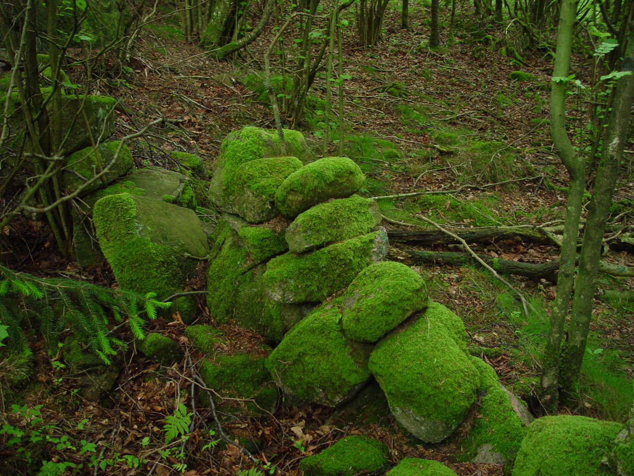 Mosegrodd steingjerde